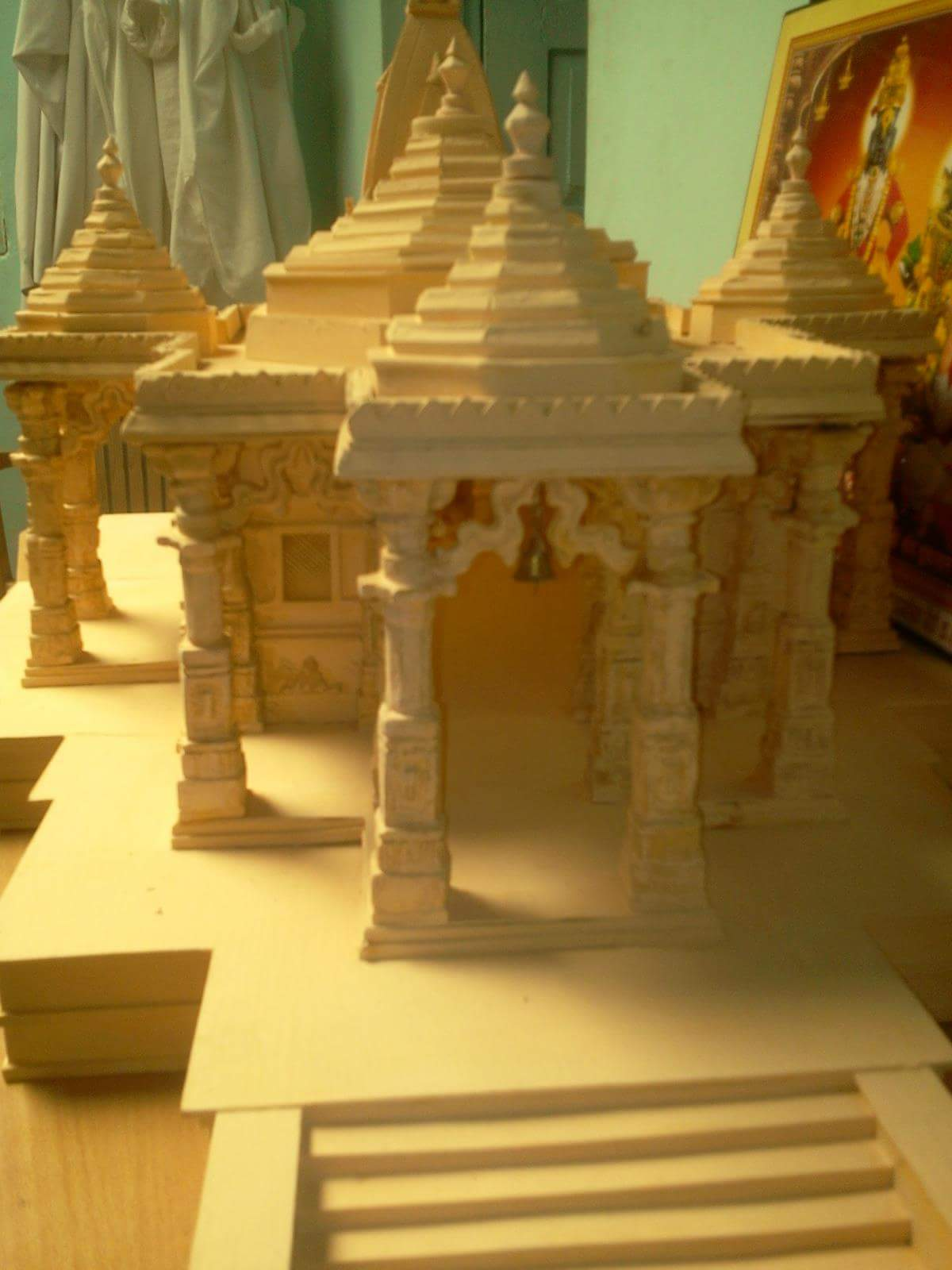 कुरंजाई माता मंदीर पर्यटनस्थळ म्हणून प्रसिद्ध आहे